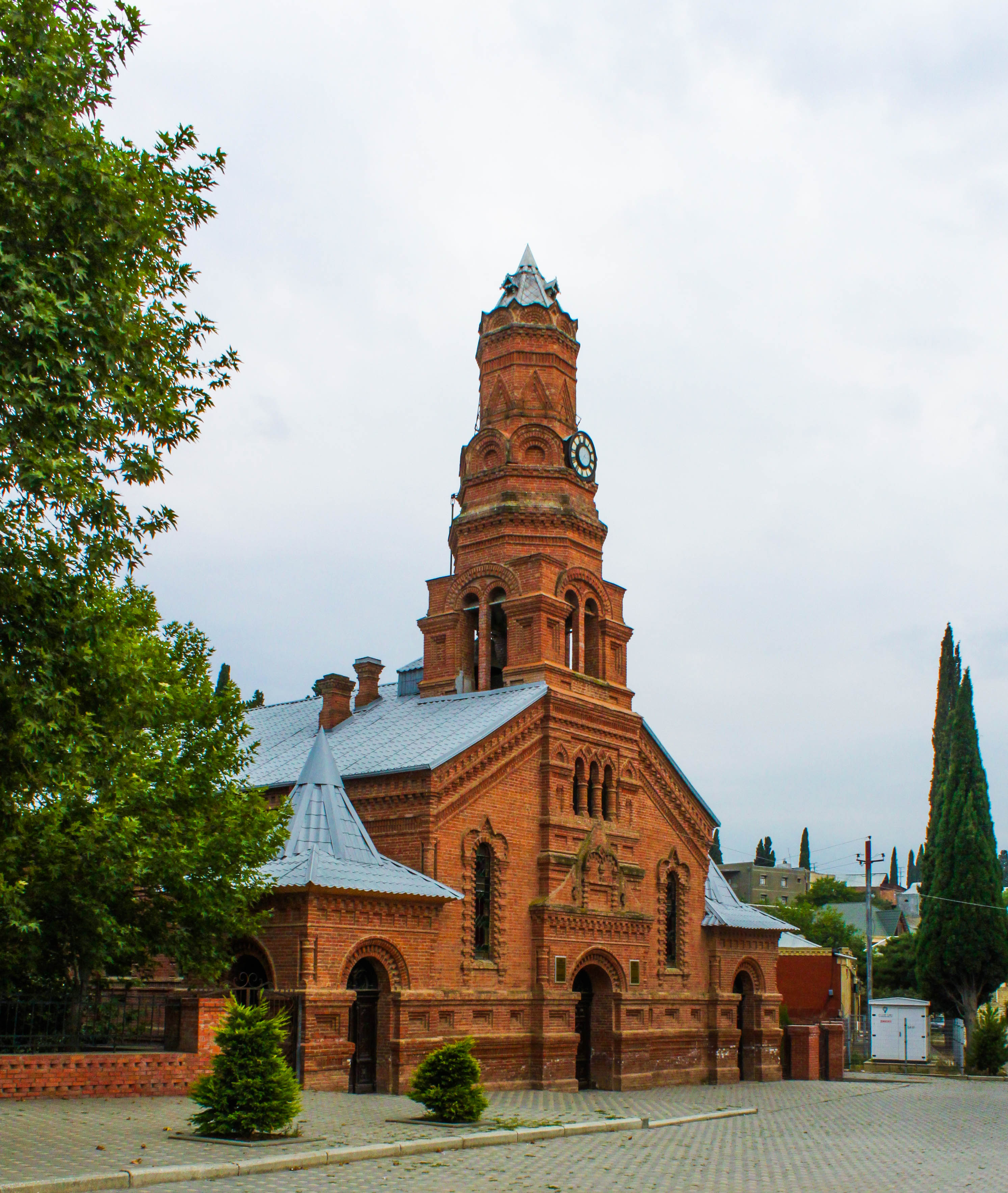 Gəncədə Lüteran kilsəsi